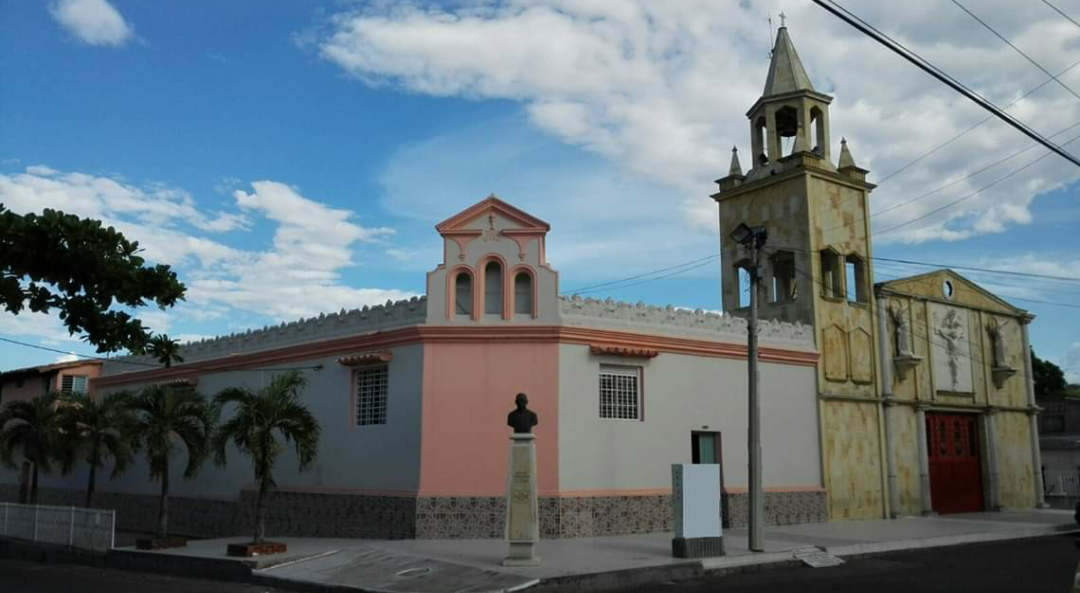 Fachada del templo católico de la Santísima Trinidad nena ciudad de Cúcuta, Colombia